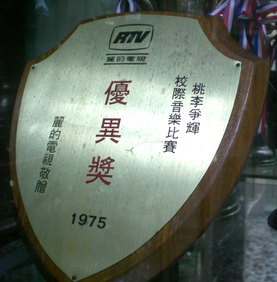 中文（香港）: 聖類斯中學 1975年麗的電視桃李爭輝校際音樂比賽優異獎